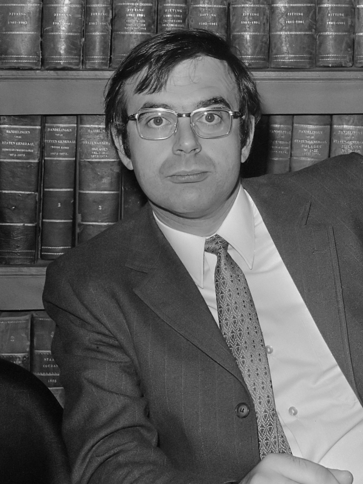 Drie progressieve partijen (PvdA, D66, PPR) presenteren schaduwkabinet, drs. J. P. Pronk (kop) 18 november 1972